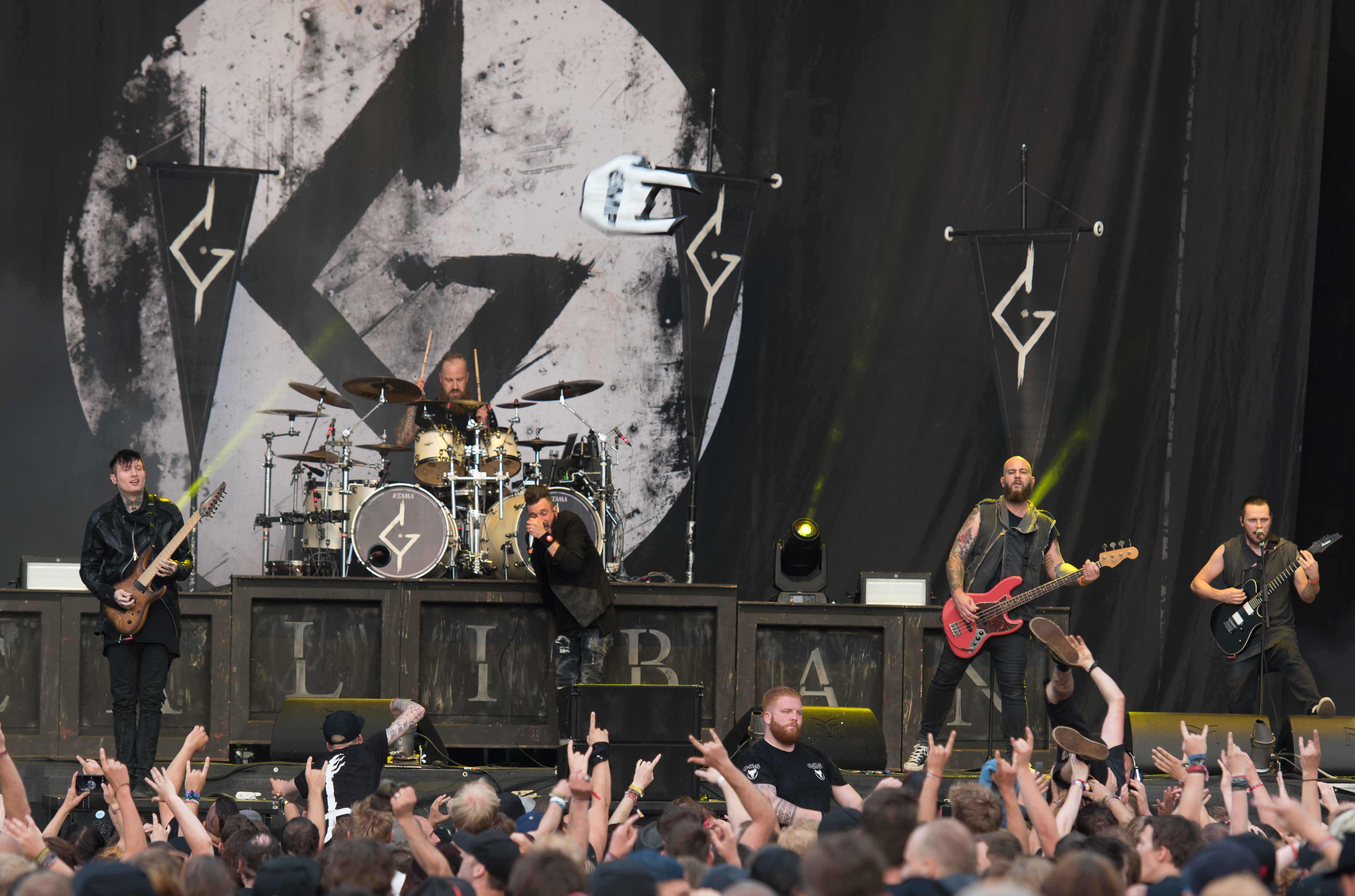 Caliban live beim Reload Festival 2017